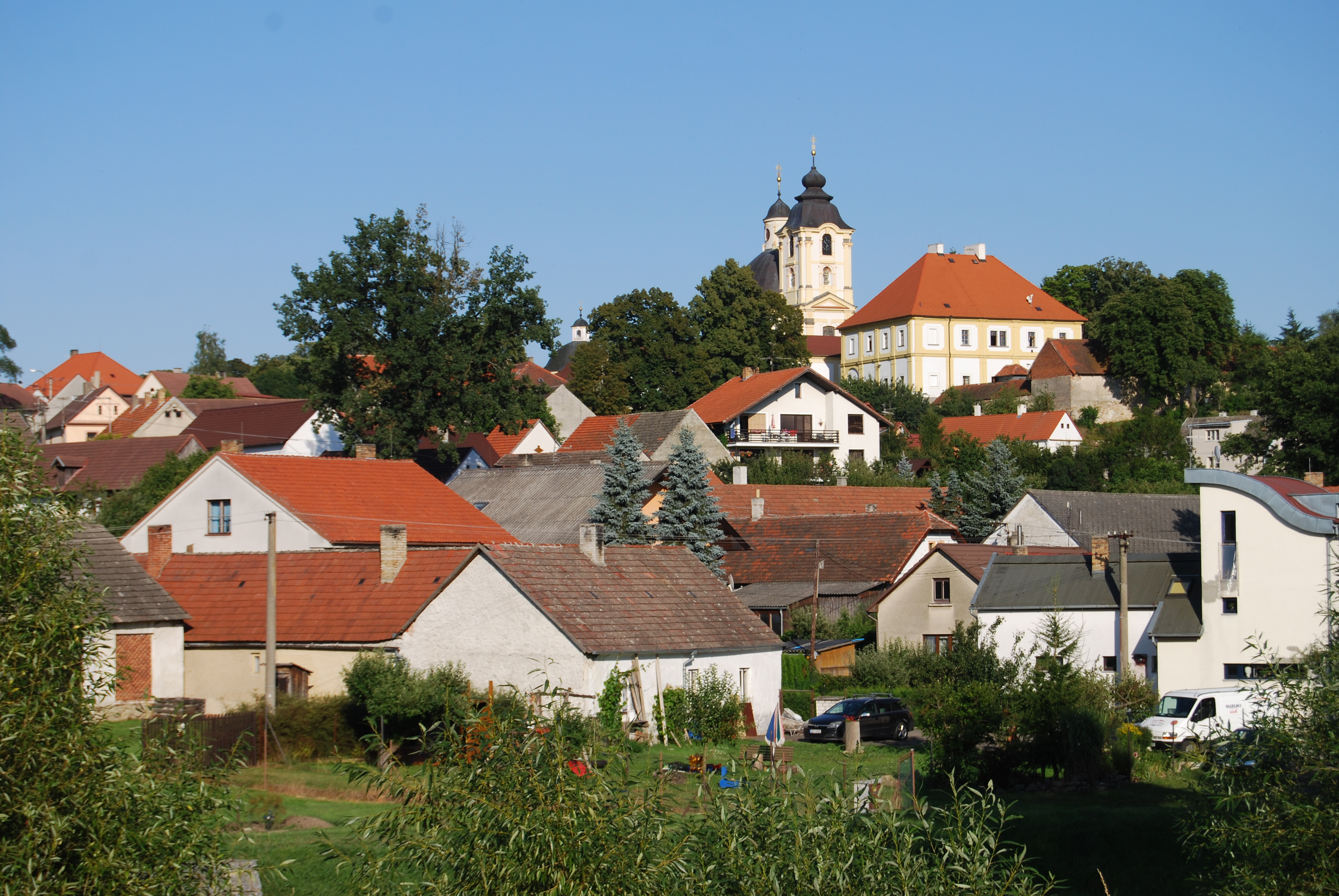 Pohled na městys z křižovatky na Zálší. Sepekov. Okres Písek. Česká republika.